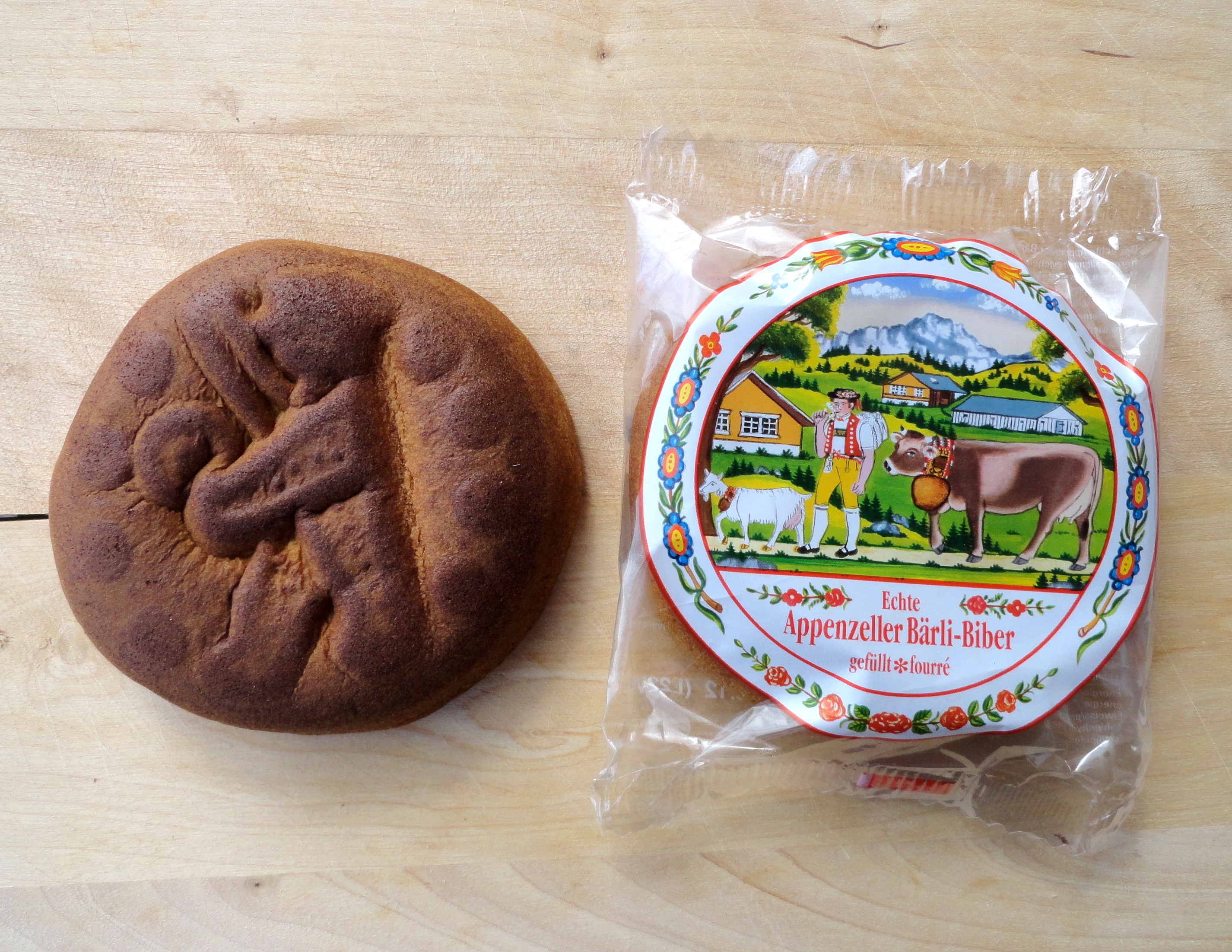 Appenzeller Biber mit Mandelfüllung; Durchmesser ca. 9 cm